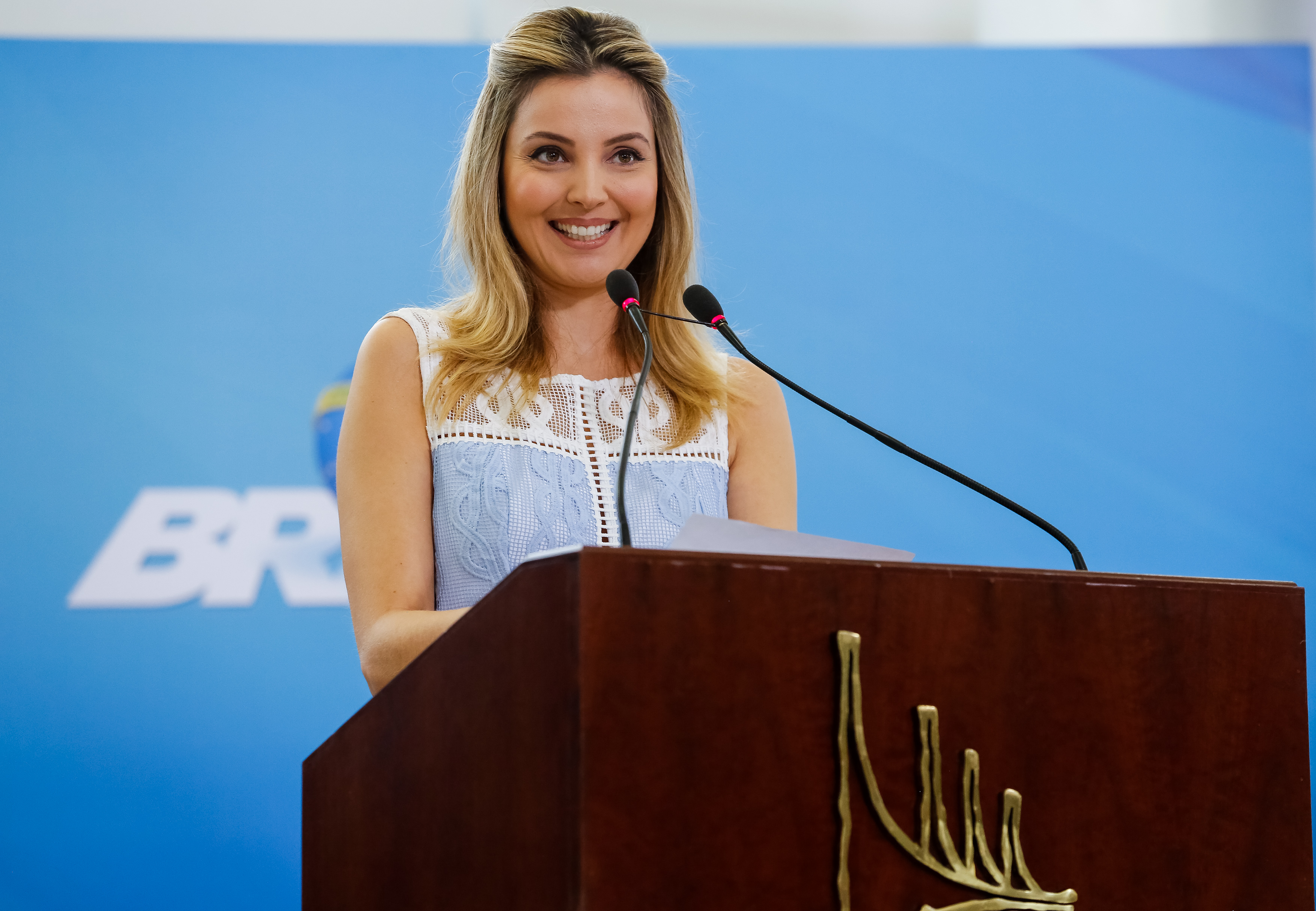 Brasília - DF 05/10/2016. Presidente Michel Temer e a Primeira-dama Marcela Temer durante cerimônia de Lançamento do Programa Criança Feliz. Foto: Carolina Antunes/PR